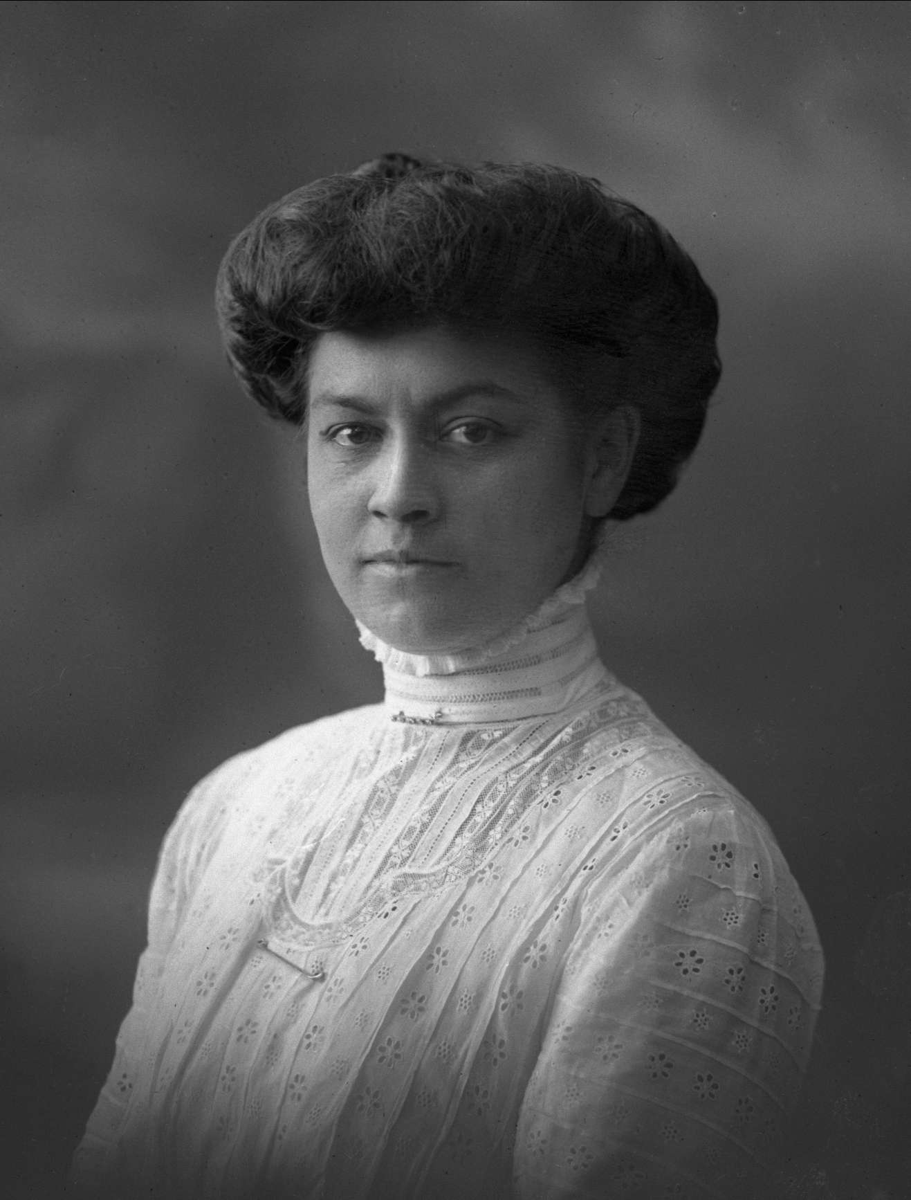 Molla Bjurstedt, senere Mallory, fotografert 1909